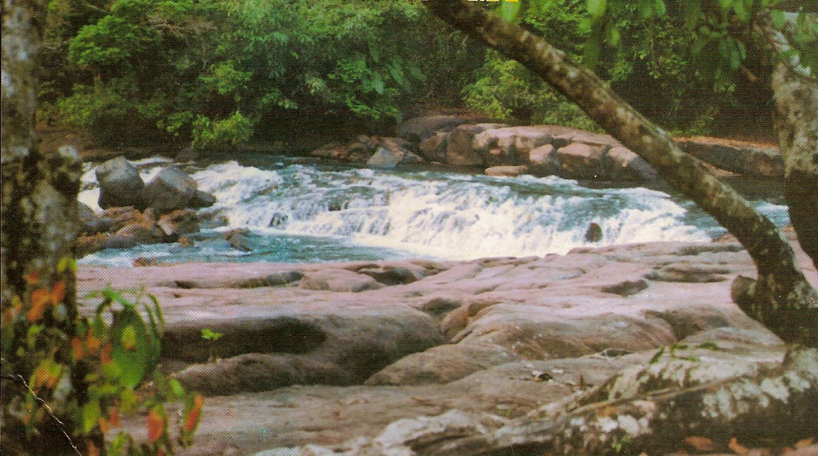 Clube de Campo Cachoerinha, ano de 1998